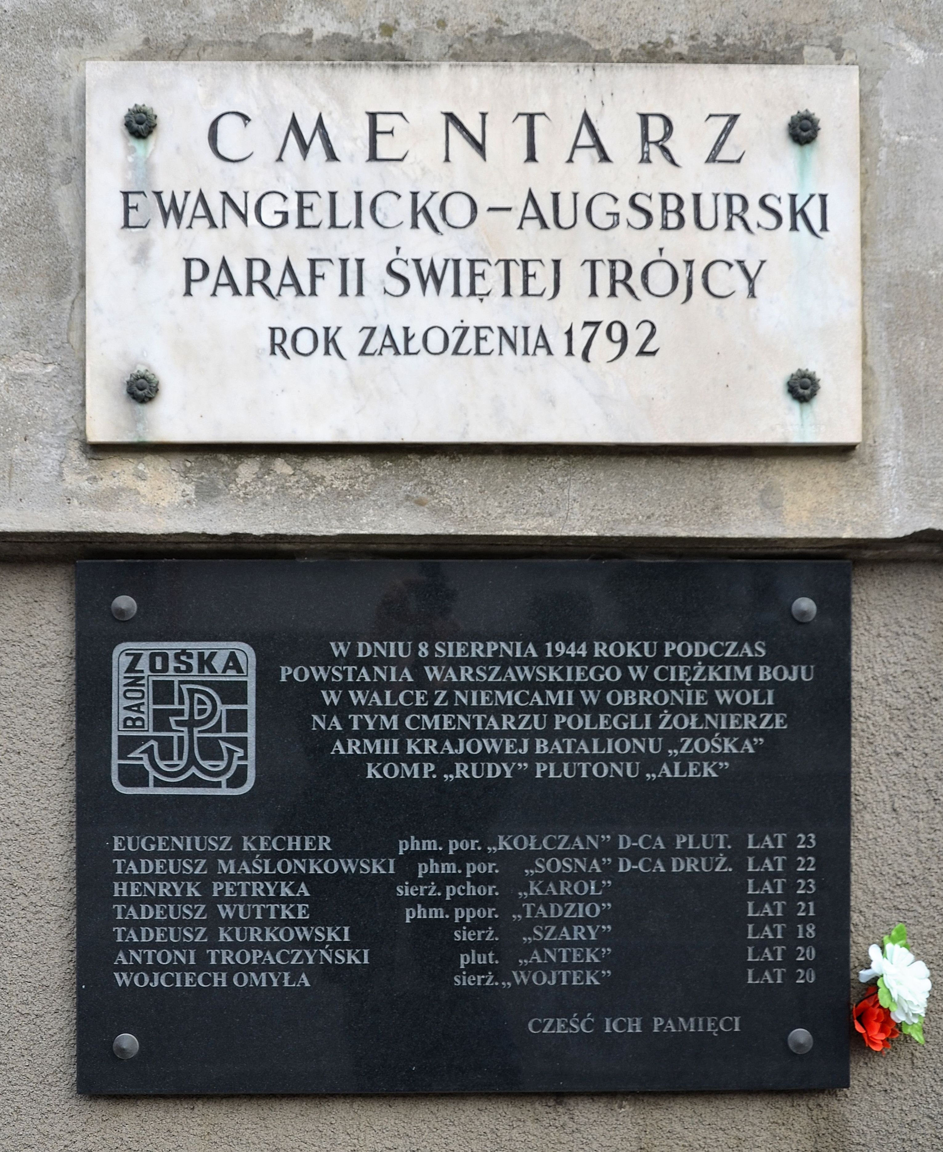 Tablica upamiętniająca żołnierzy Batalionu Zośka przy bramie głównej cmentarza ewangelicko-augsburskiego